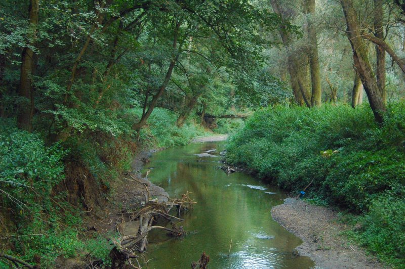 Myjava in CHKO Záhorie